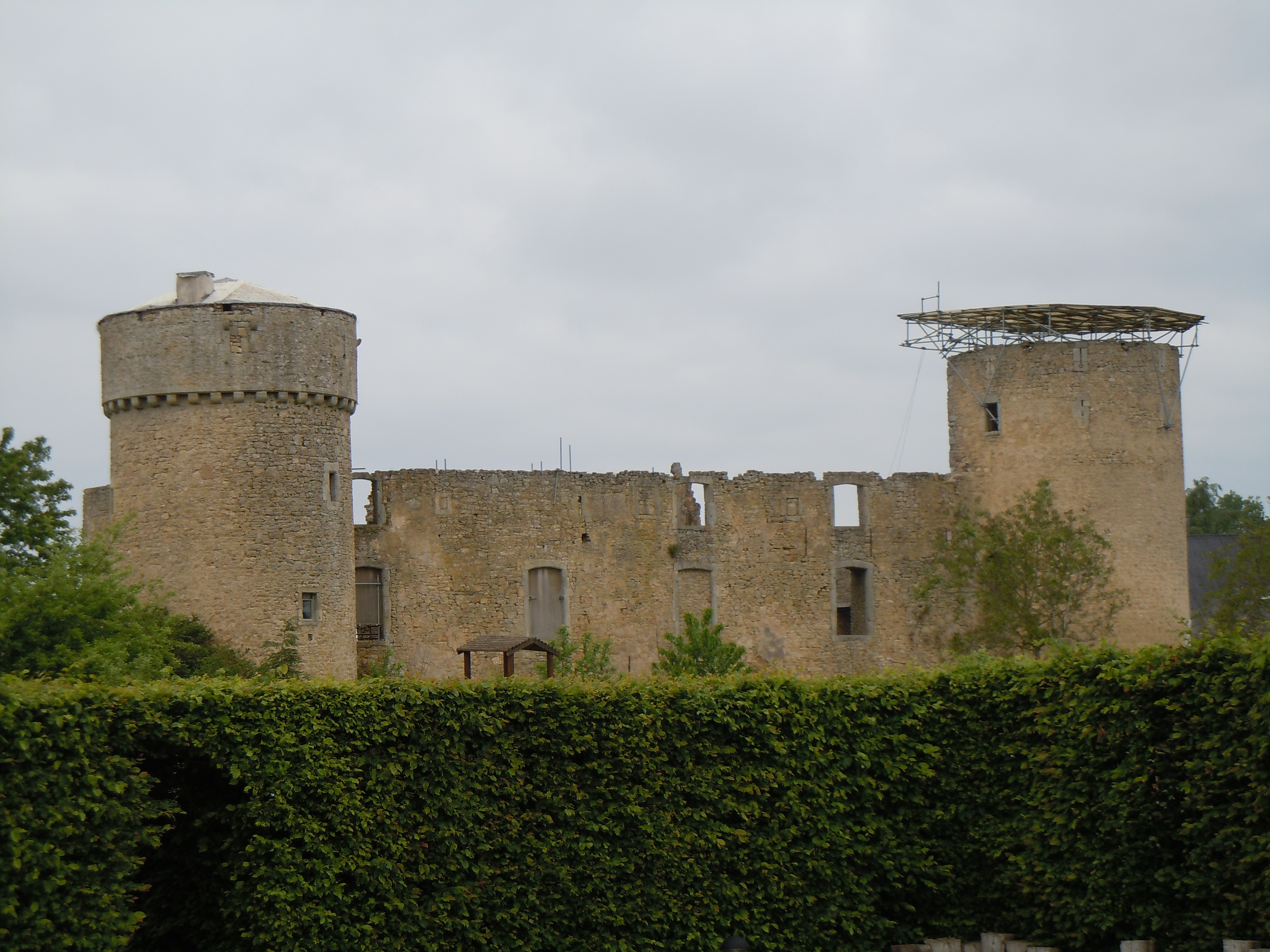 Le château d'Autelbas (Belgique) vu de l'est